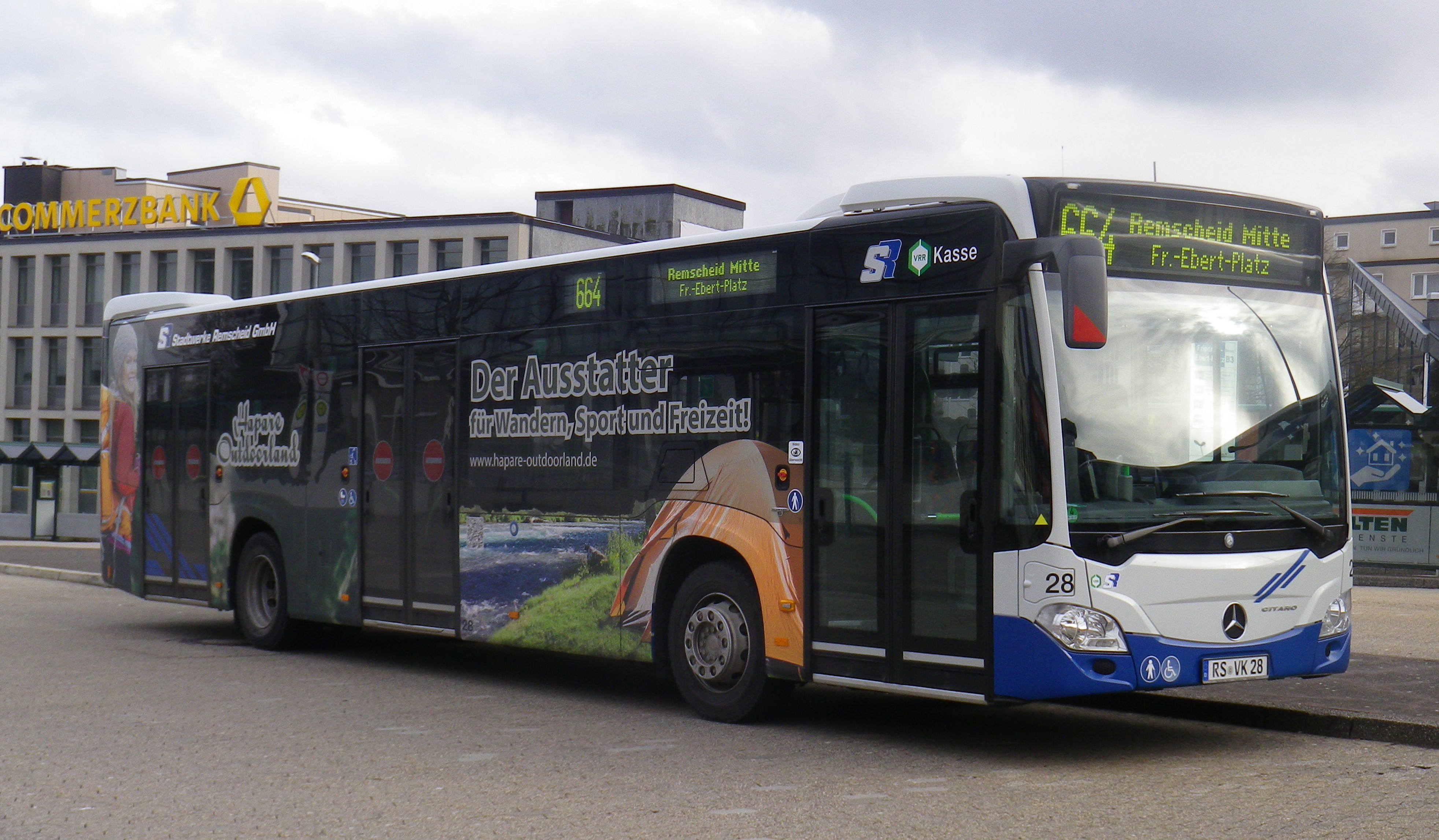 Wagen 28 ist einer der neuen dreitürigen Busse der Stadtwerke Remscheid